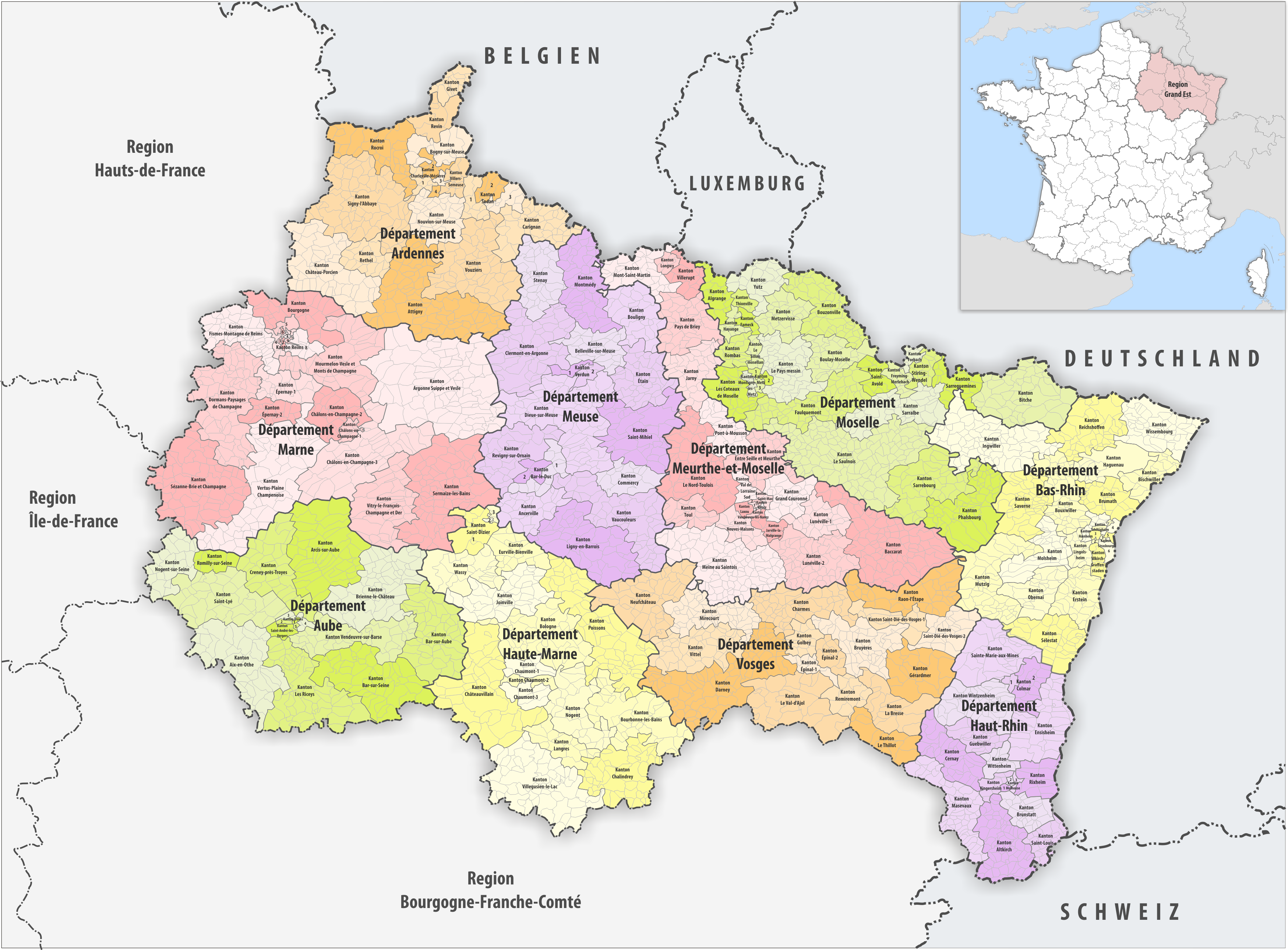 Gemeinden, Kantone und Departemente in der Region Grand Est